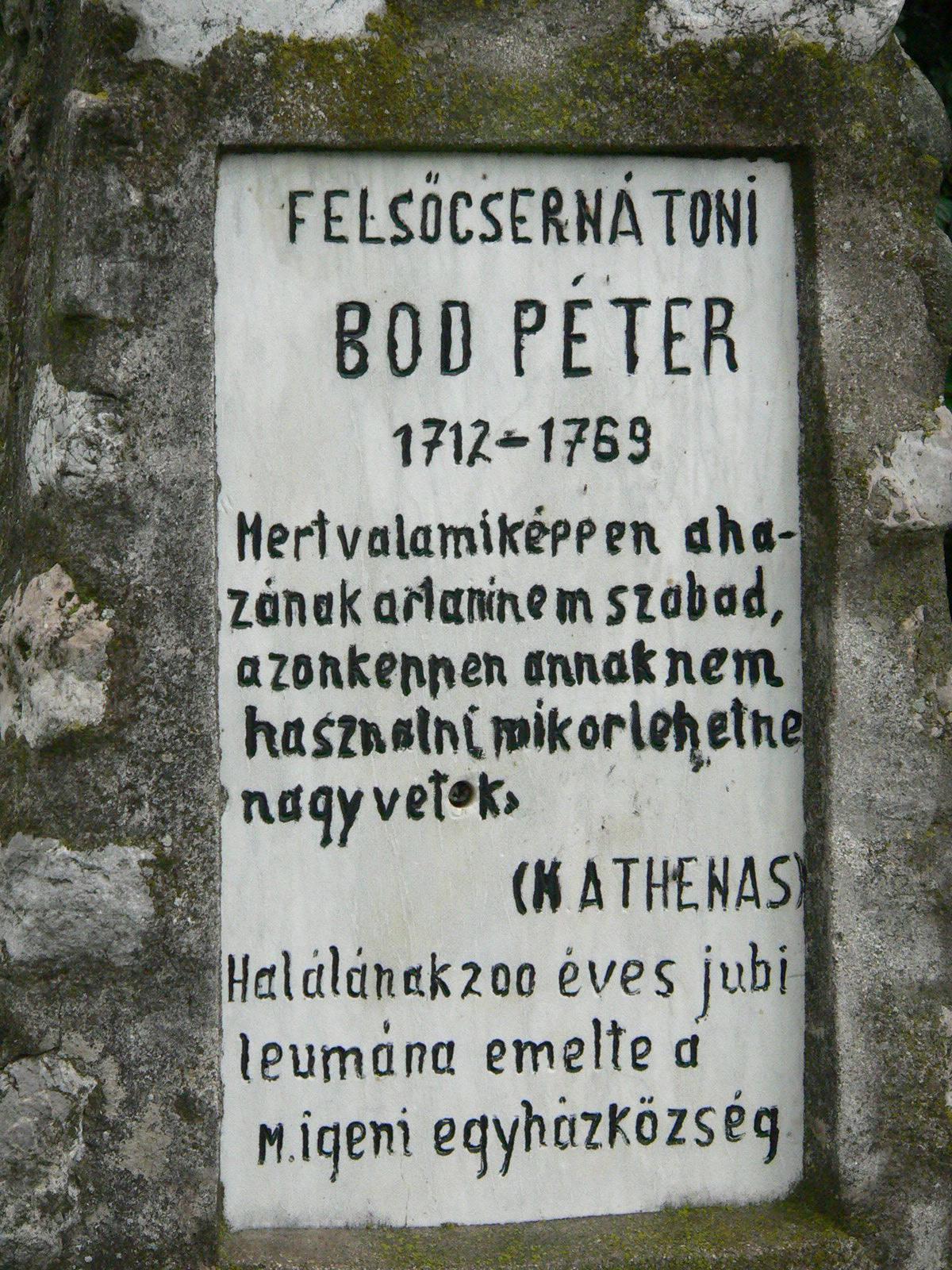 Bod Péter síremléke, Magyarigen